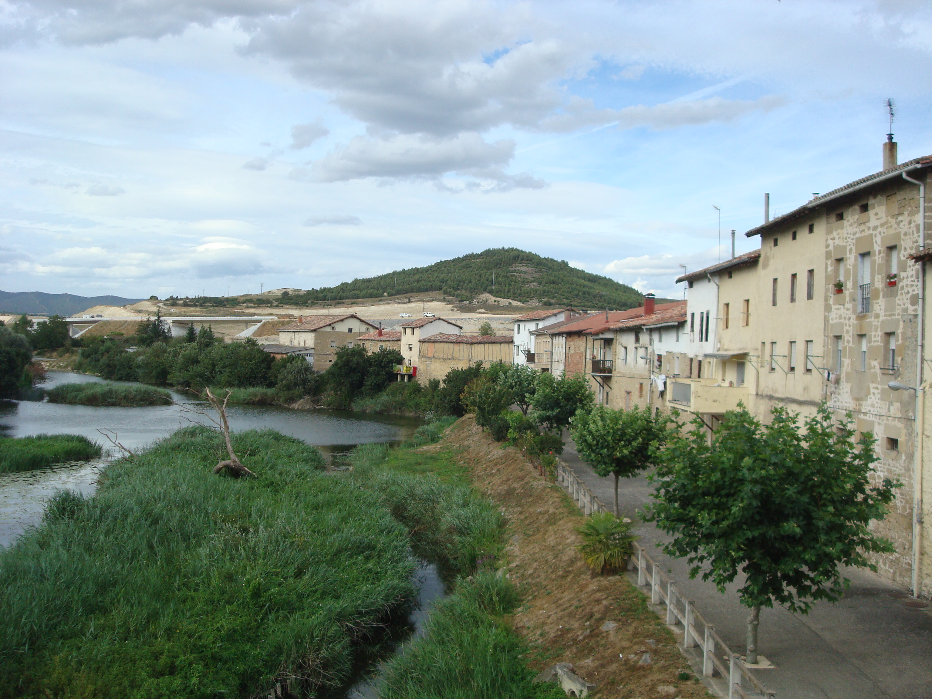 Armiñon - 003